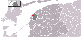 Locatie van Sexbierum, zelf gemaakt uit sjabloon van Wikipedia-gebruiker Mtcv